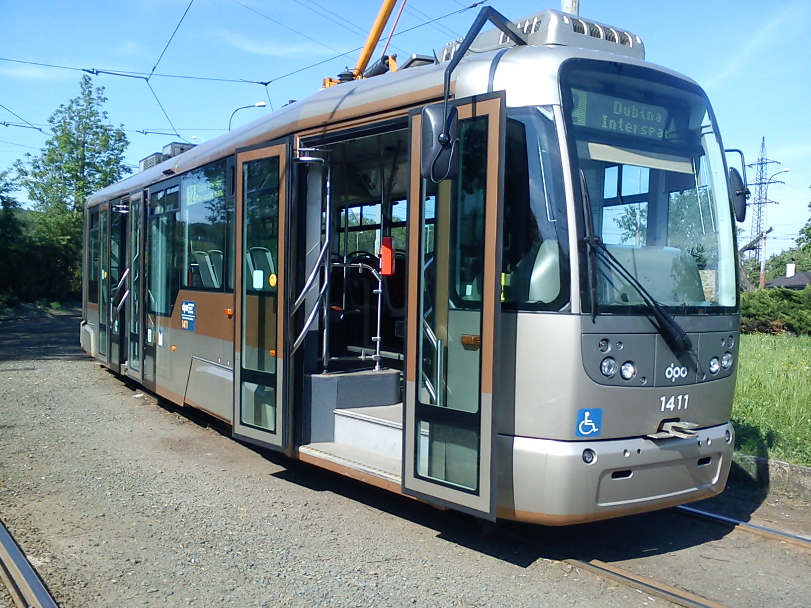 Vario LF2+ v Ostravě